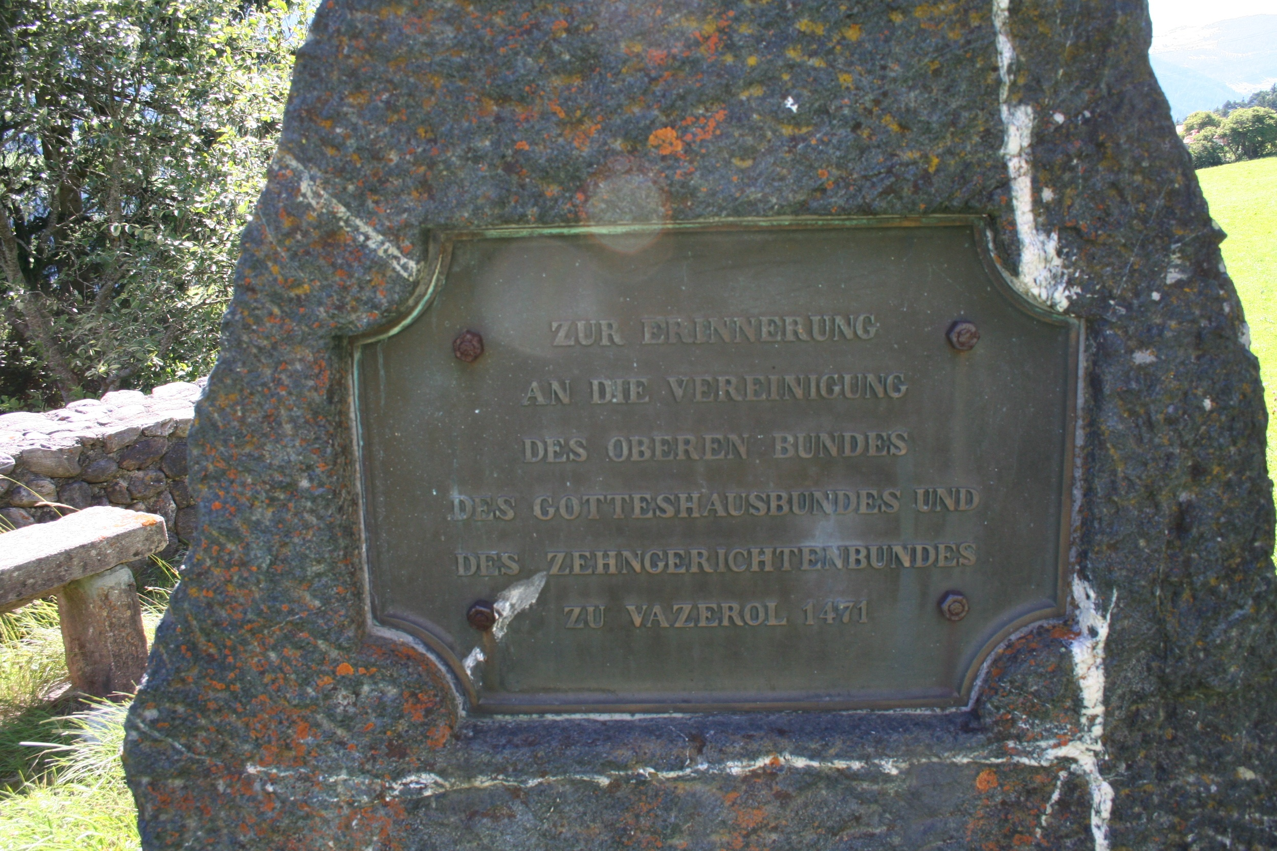 Tafel zur Erinnerung an die Vereinigung der drei Bünde in Vazerol 1471